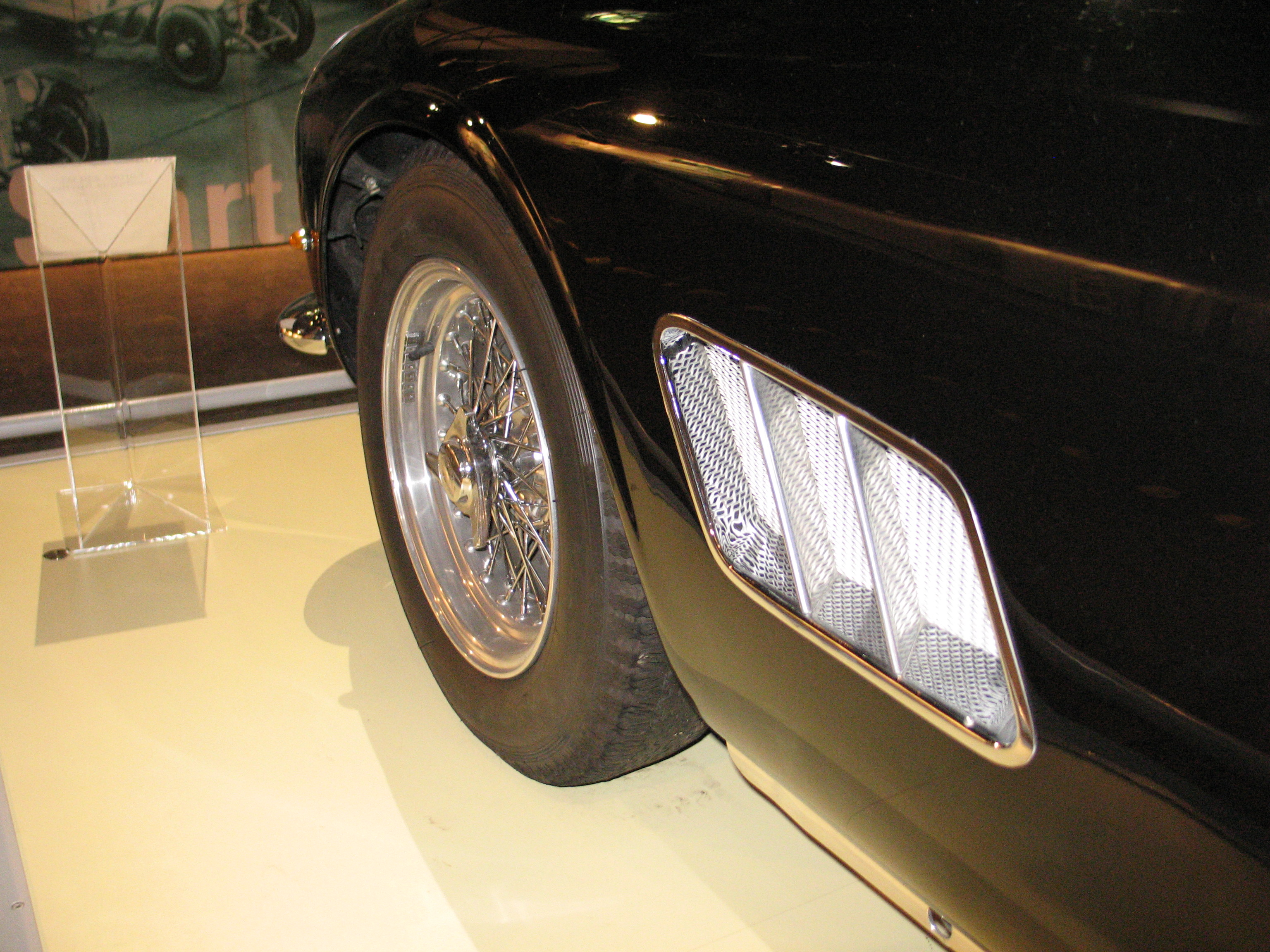 Prise d'air latérale d'une Ferrari 250 GT California Spyder